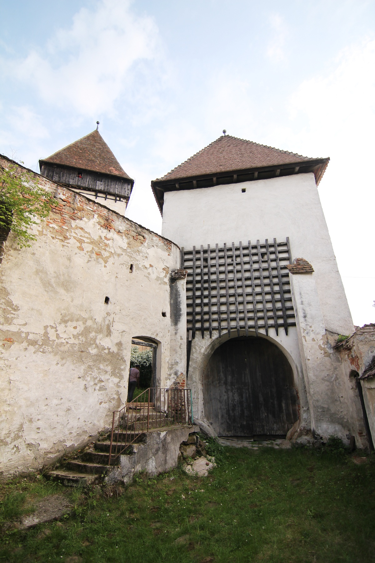 Hosman: Incintă fortificată interioară, cu două turnuri, bastion șiturndepoartă 02